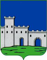 Герб с. Гологори